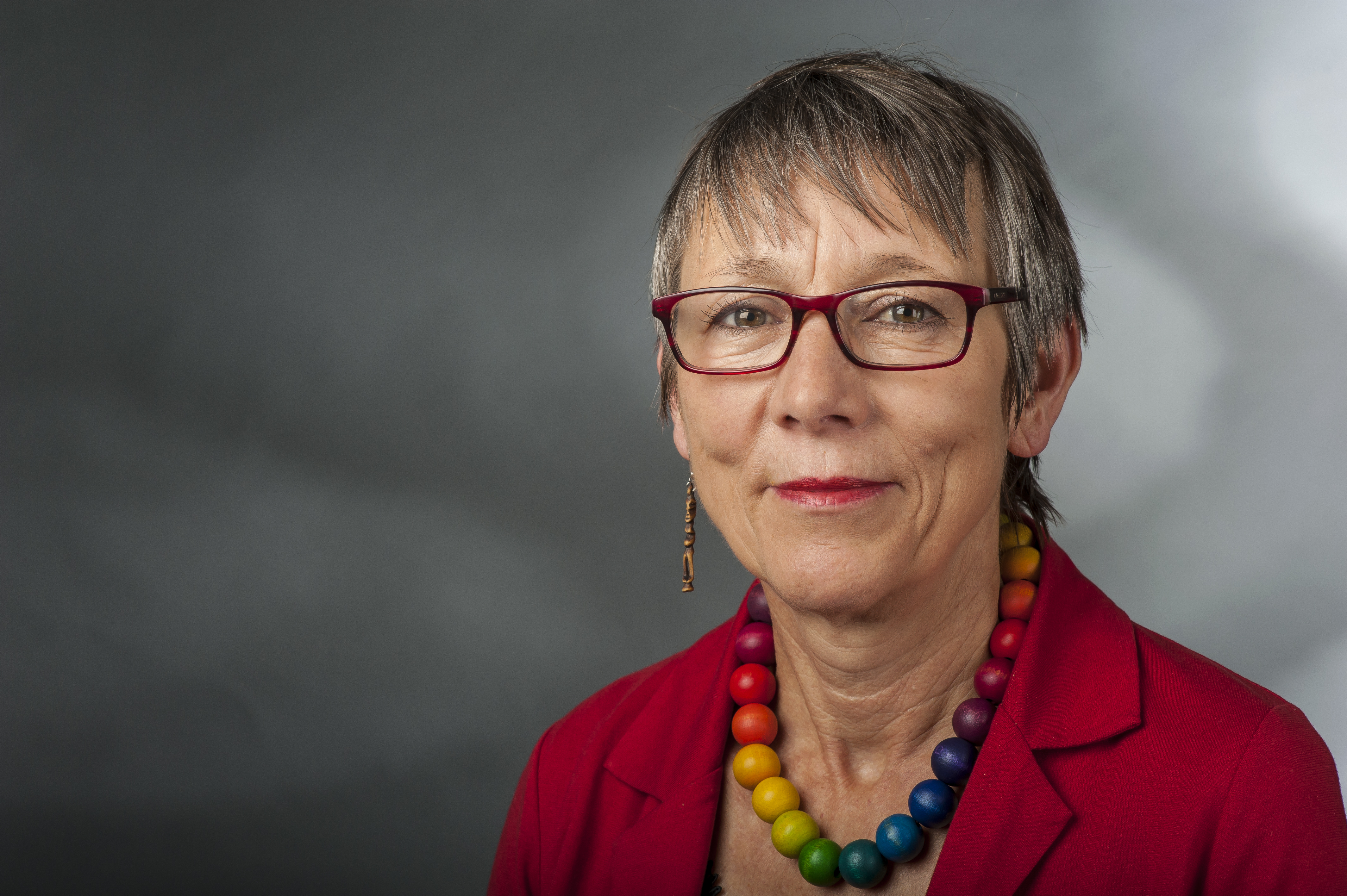 Annette Groth (* 16. Mai 1954 in Gadderbaum, heute zu Bielefeld) ist eine deutsche Politikerin (MdB, Die Linke) aus Baden-Württemberg.